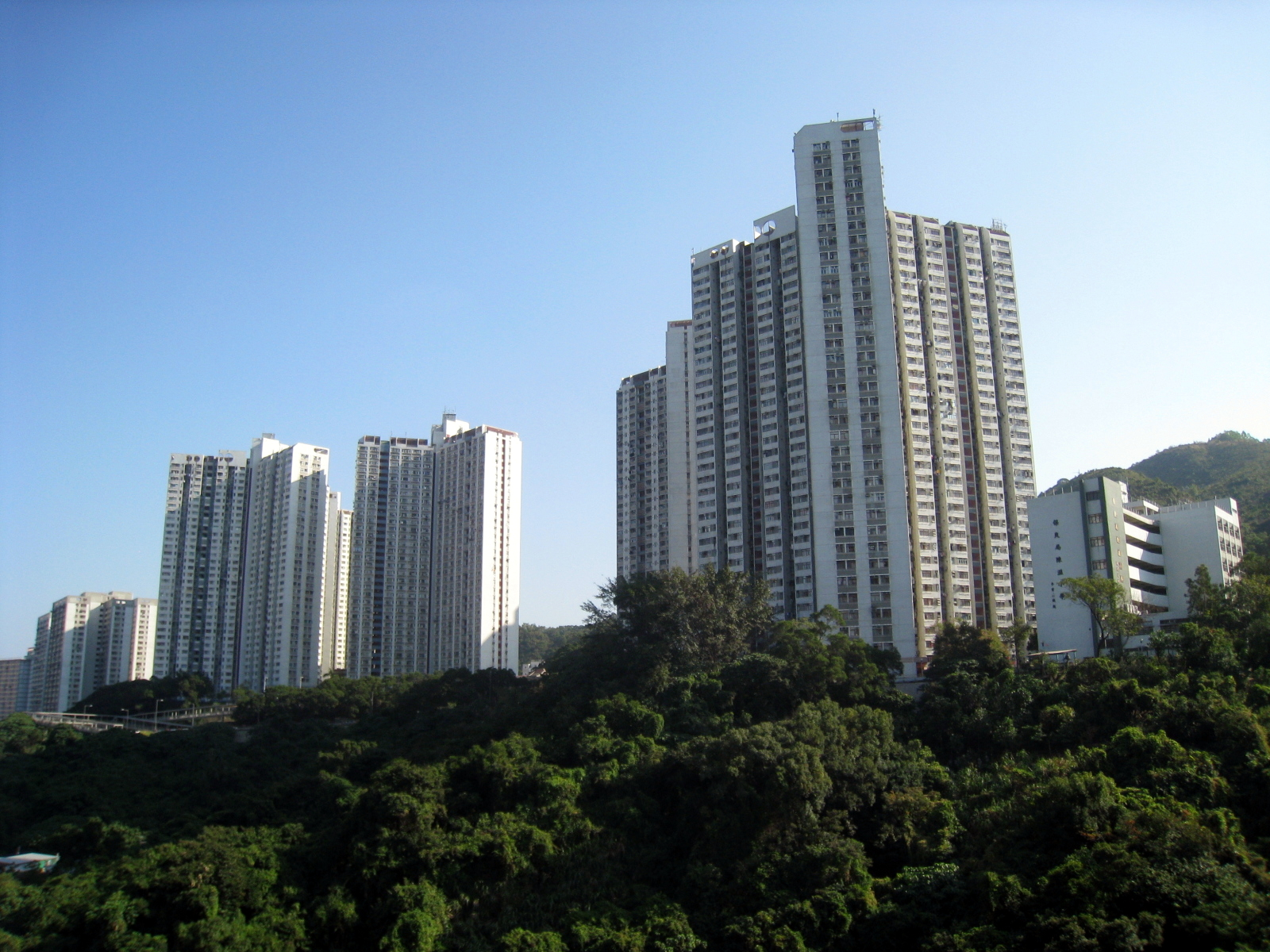 Cheung Hong Estate Phase 2